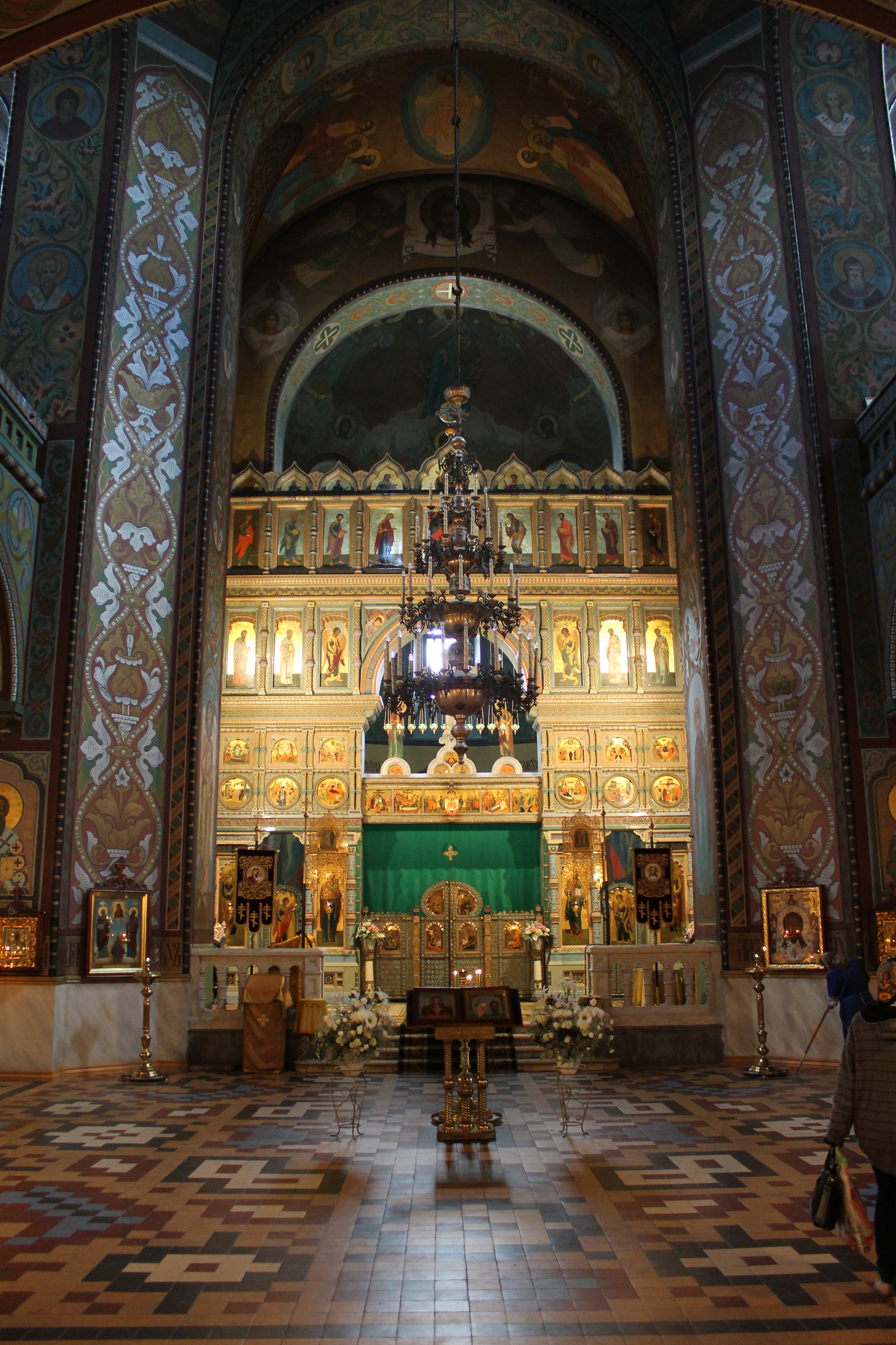 Собор Петра и Павла (Санкт-Петербург, Петергоф, Санкт-Петербургский проспект, 32)